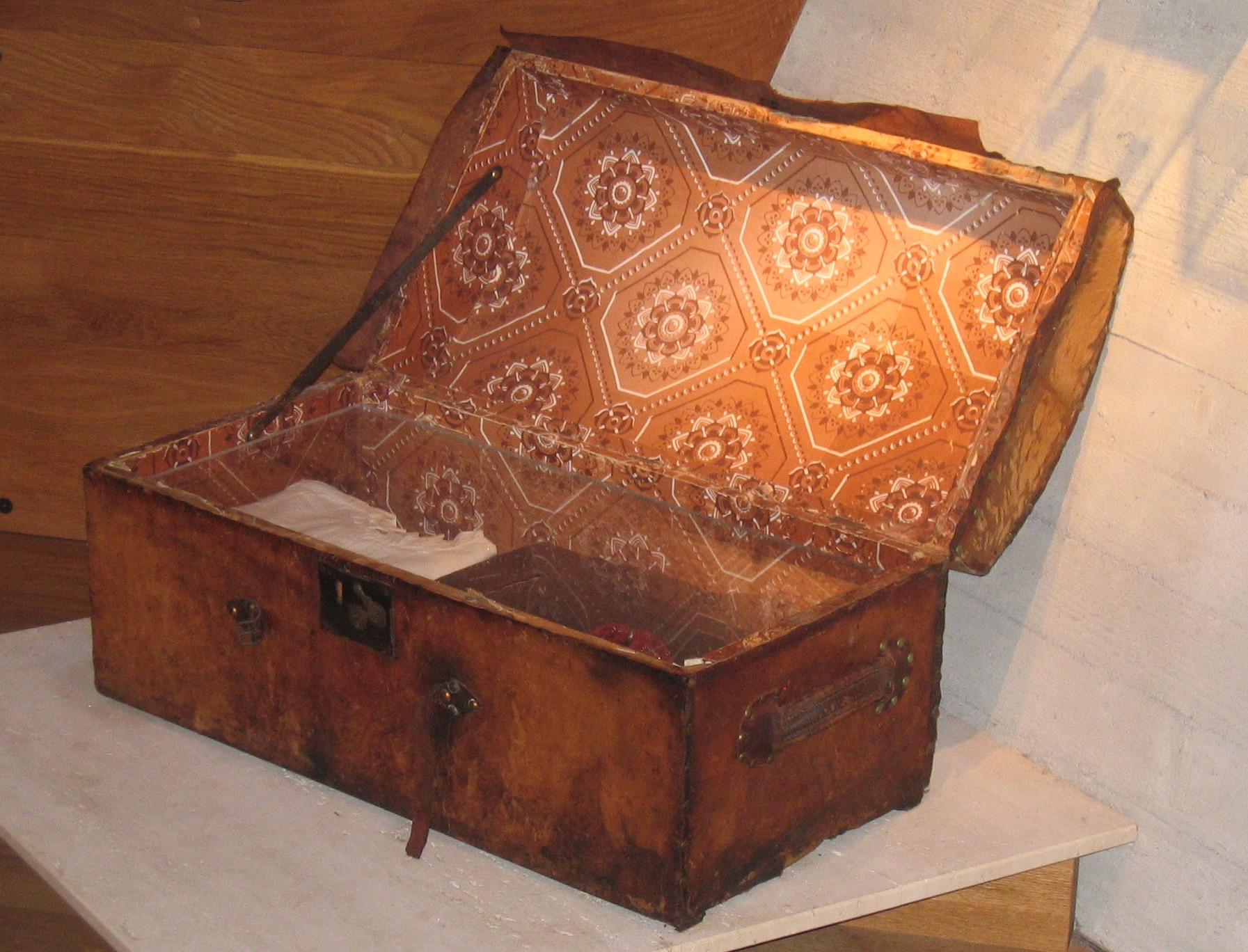 Reisekisa til Ivar Aasen utsilt på Ivar Aasen-tunet